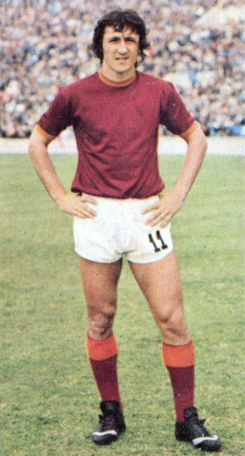 Il calciatore italiano Valerio Spadoni alla Roma all'inizio della stagione 1974-75.